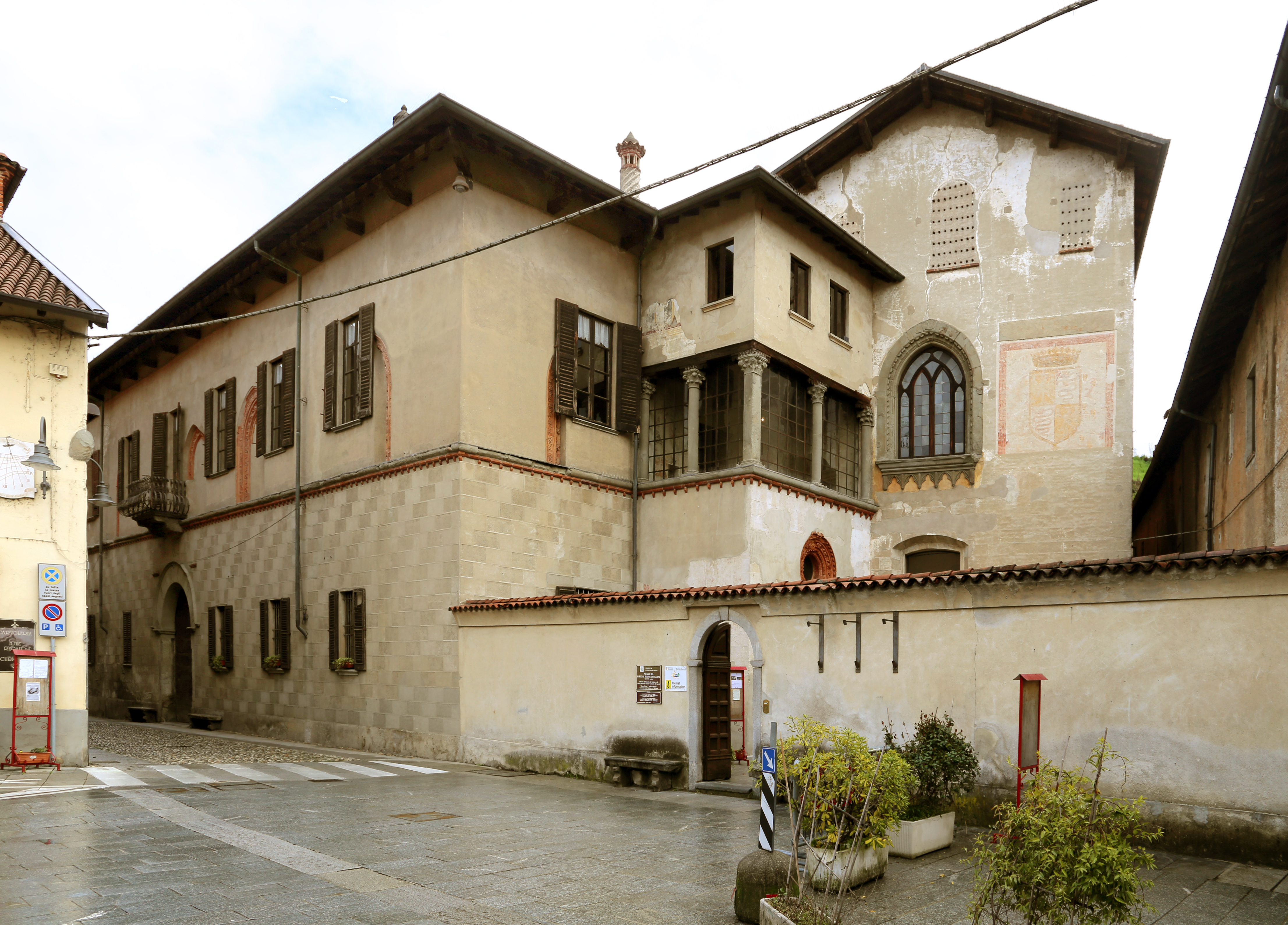 Museo civico Branda Castiglioni This is a photo of a monument which is part of cultural heritage of Italy.